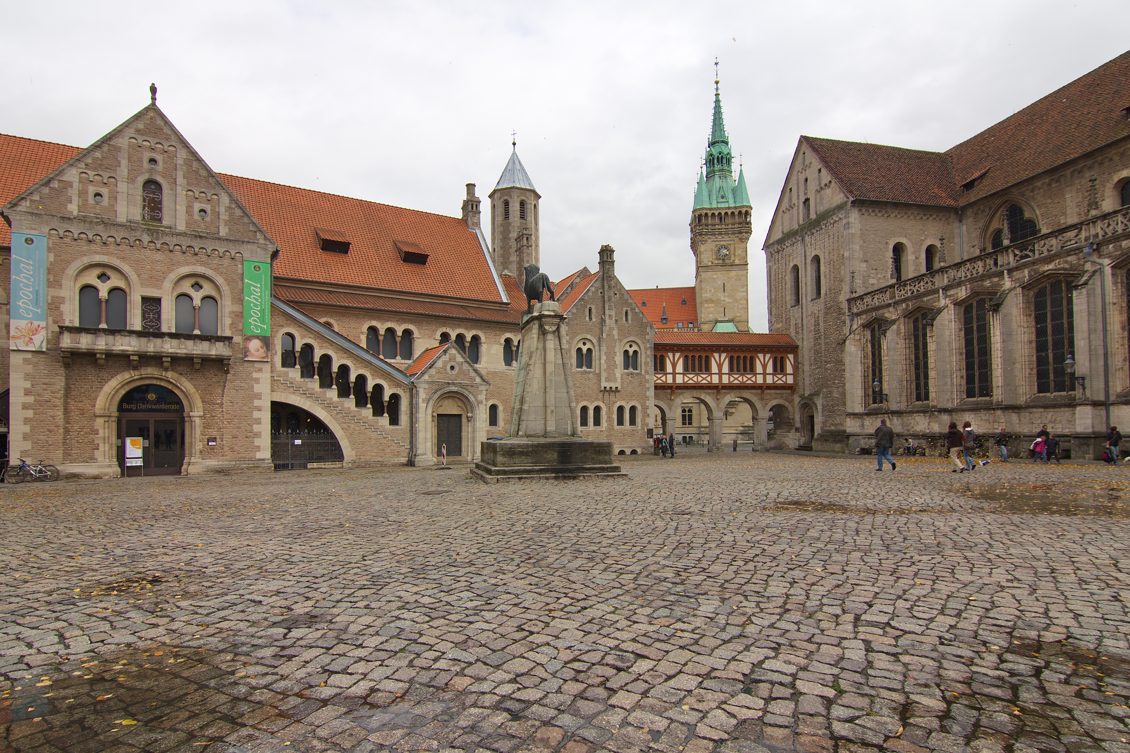 Die Burg Dankwarderode am Burgplatz in Braunschweig ist eine sächsische Niederungsburg. Sie war über Jahrhunderte Residenz der Braunschweiger Herzöge und ist heute Teil des Herzog Anton Ulrich-Museums.